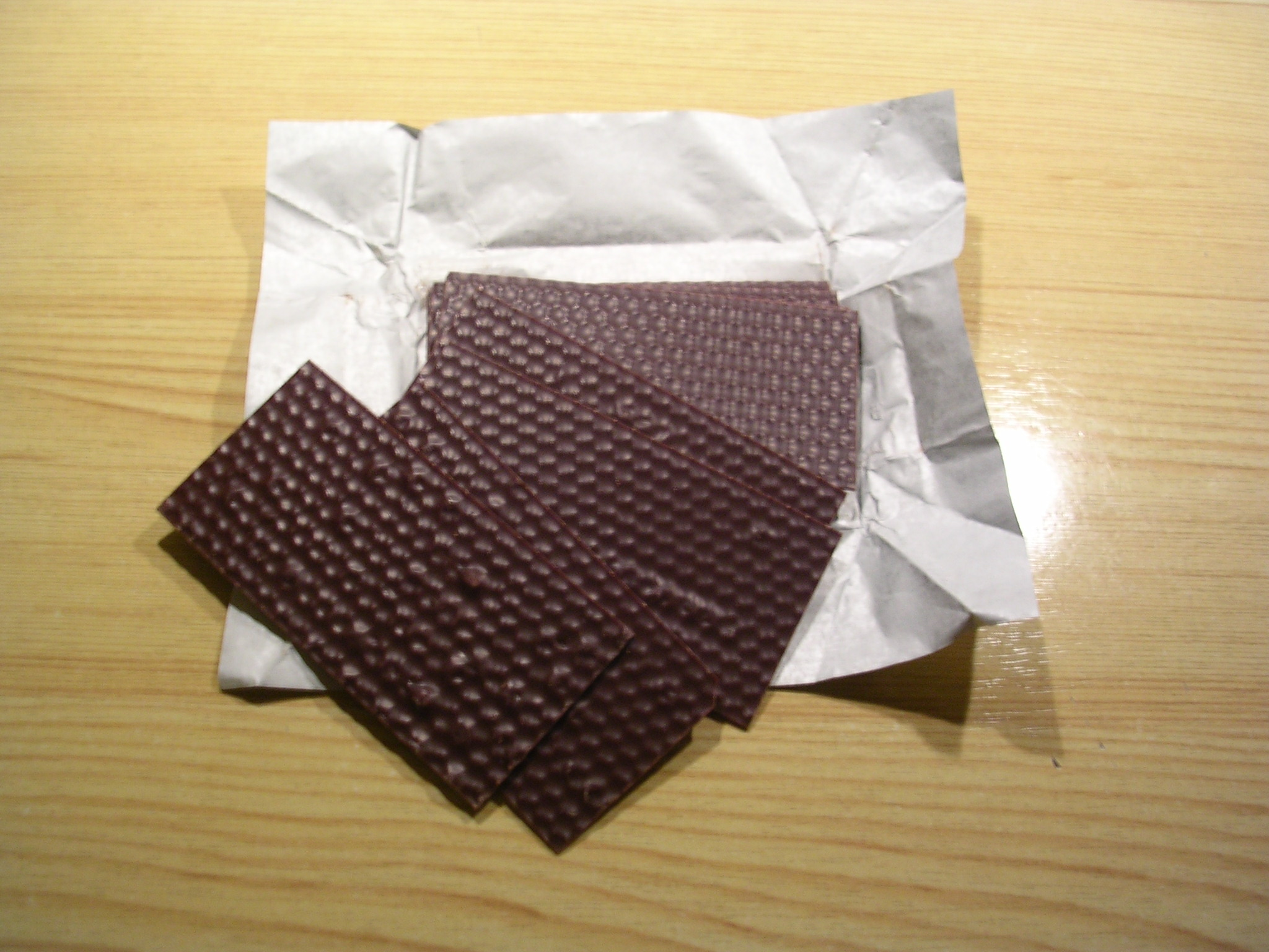 Author: Väsk Date: August 2005